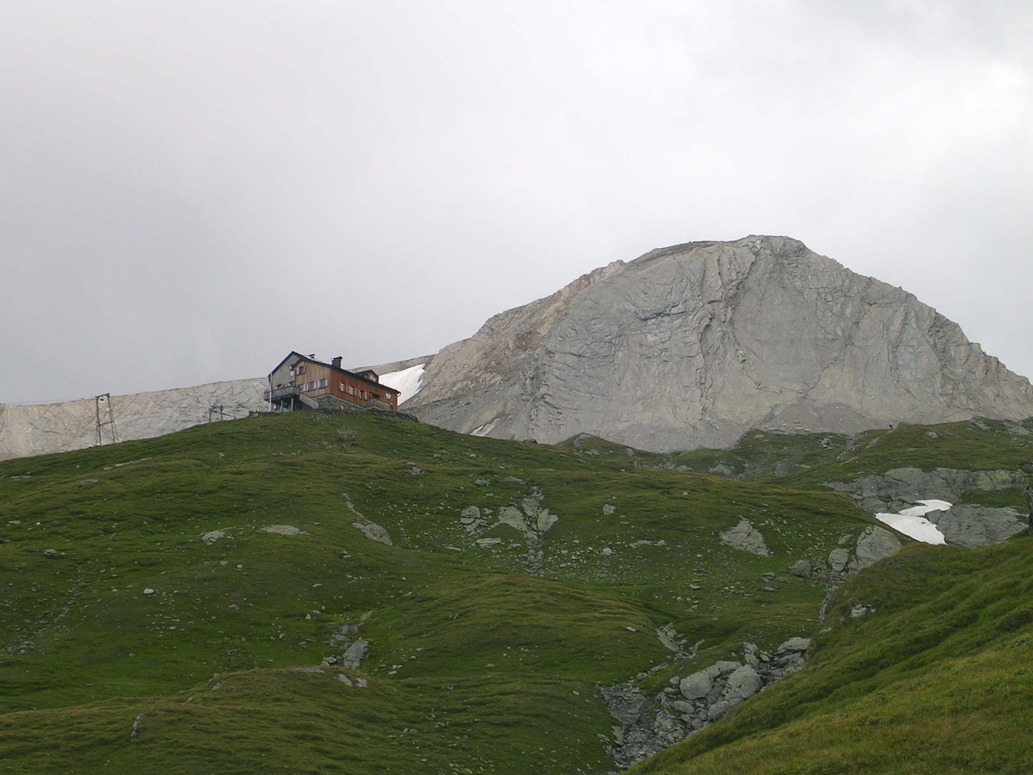 Südlicher Wellachkopf mit Sudetendeutscher Hütte